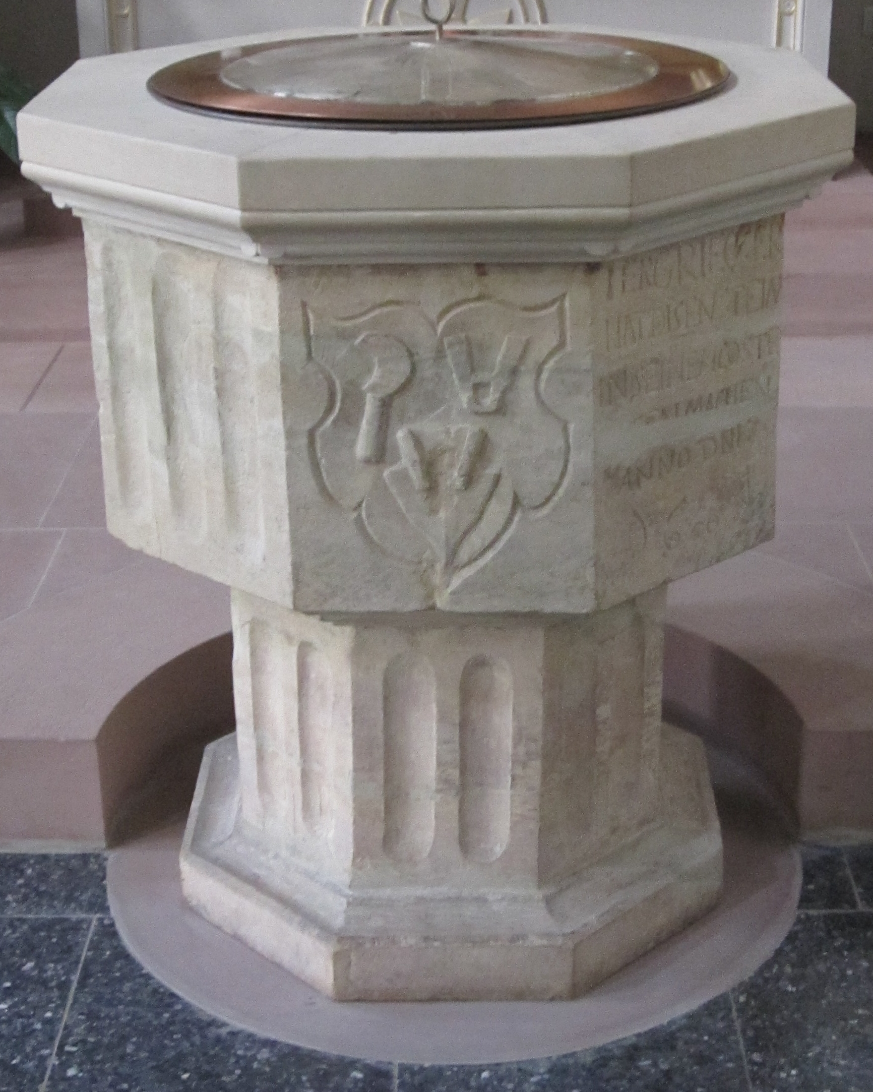 Taufbecken mit Wappen